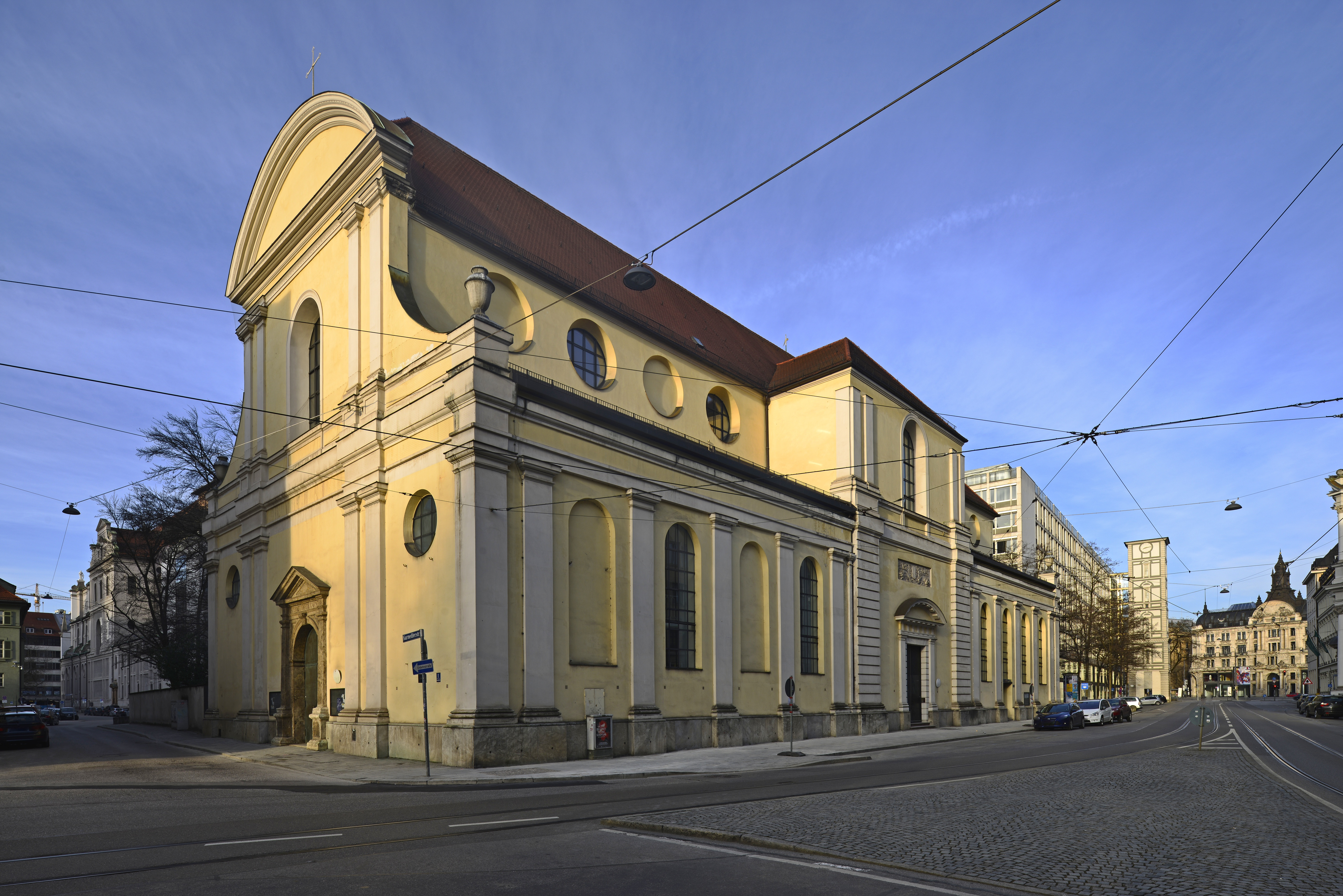 München, Fassadenansicht der ehemaligen Karmeliter Kirche, oder Carmeliter Kirche an der Karmeliter Straße, oder auch Kirche am Seminarium. Zuvor Klosterkirche der Karmeliter am Promenadeplatz, vormals Pfandhausstraße. Höhenfestpunkt 1928 - Studienkirche Karmeliterstraße 2, Bolzennummer 36, Höhe über normal null 516,849 Meter.